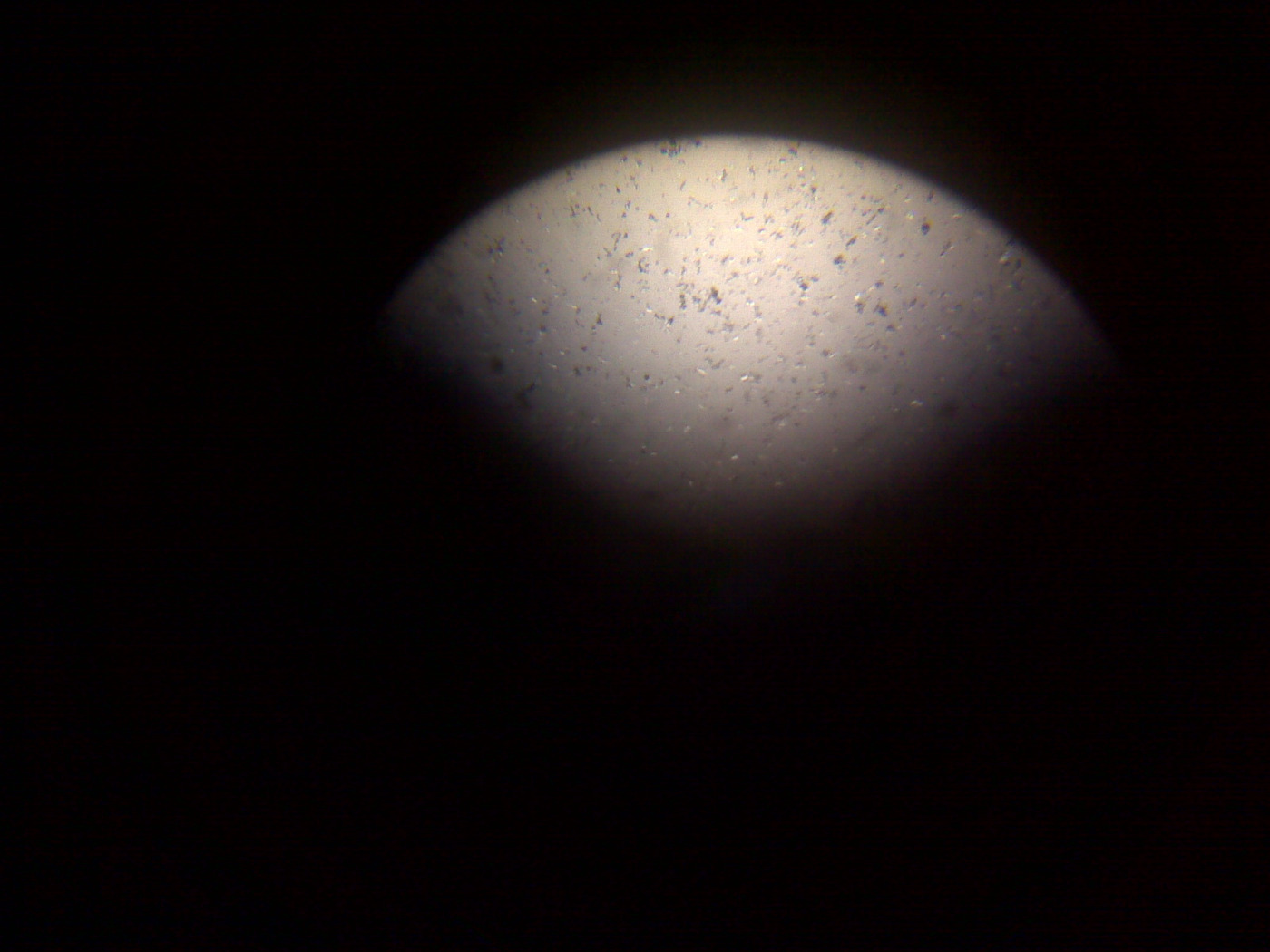 "Yo Dormiré en el Polvo" microfotografía del polvo recolectado durante cuatro noches. (Microfoto_@EdithMedina)